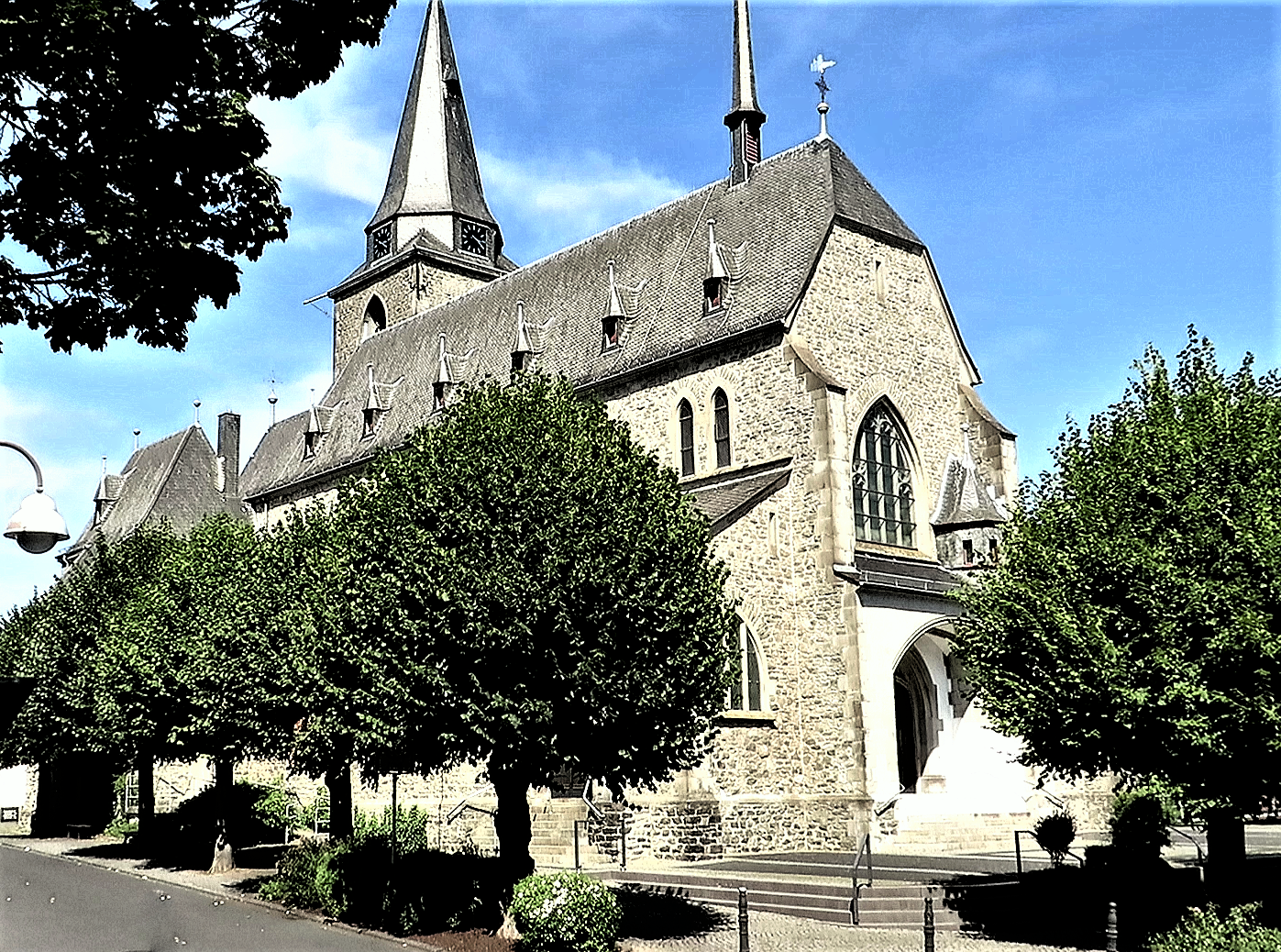 Pfarrkirche St. Laurentius von 1901 in Dernbach